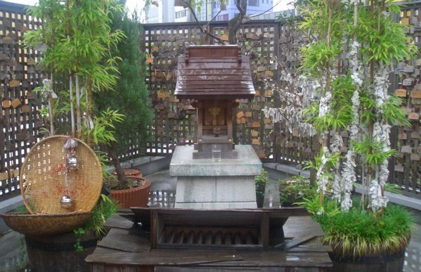 binbo-gami jinja, Kōtō, Tokyo, Japan (貧乏神神社 亀戸分社)